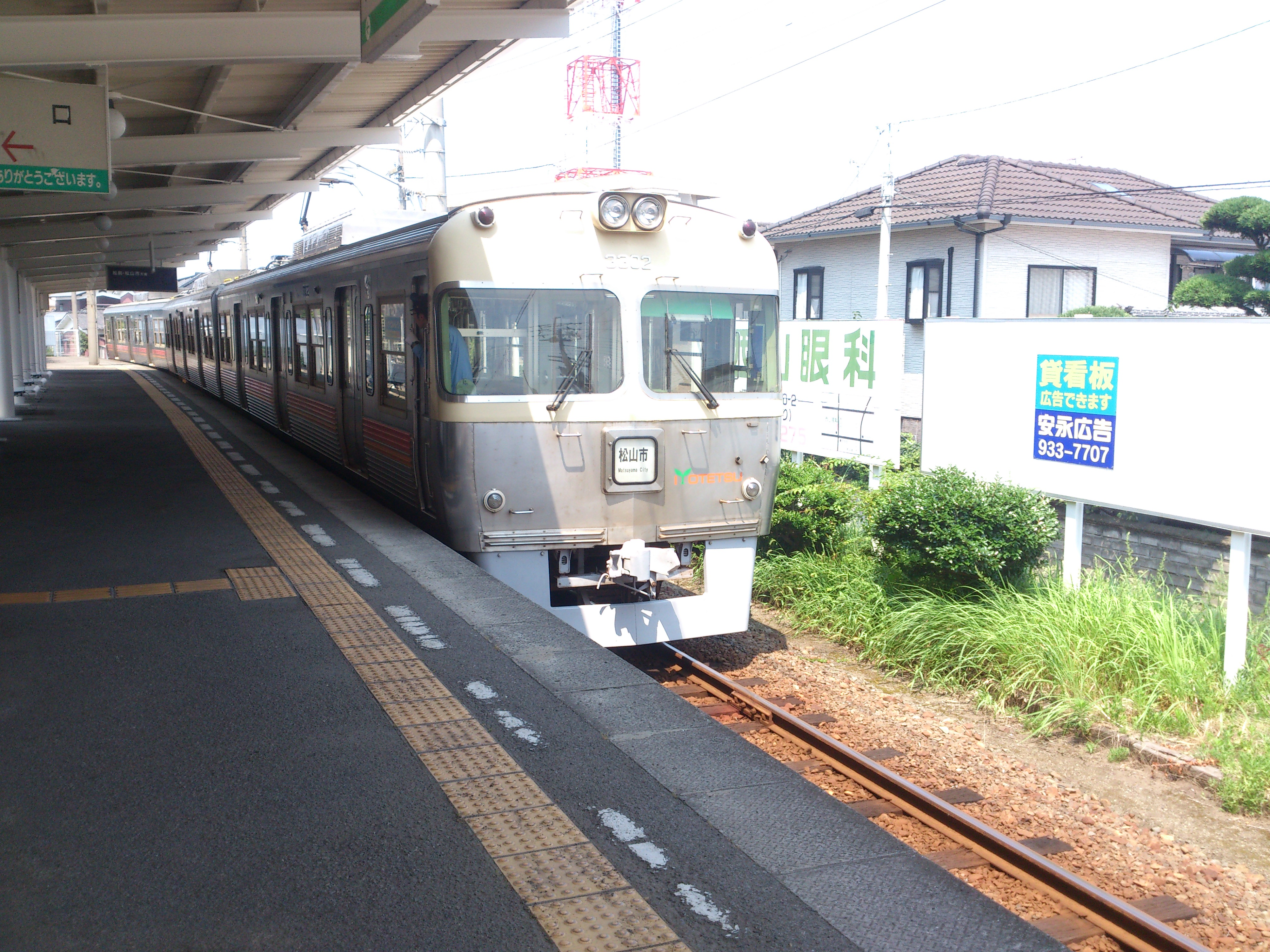 伊予鉄道 郡中駅に入線中の3000系電車